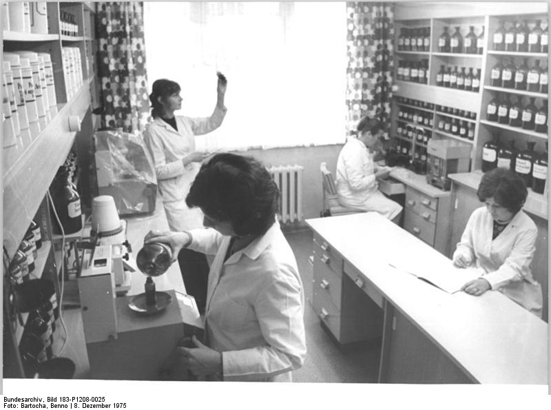 Friedland, Apotheke, Rezepturraum ADN-ZB Bartocha 8.12.75 DDR-Aktuell- Bez. Neubrandenburg: Neue soziale Einrichtung für Kleinstadt- Eine neue moderne Apotheke wurde am 8.12.75 in der mecklenburgischen Kleinstadt Friedland übergeben. Gegenüber der alten Apotheke verbesserten sich auch die Arbeits- und Laborbedingungen des Apothekerkollektivs. Hier ein Blick in den Rezepturraum. (Siehe auch ADN-Meldung).